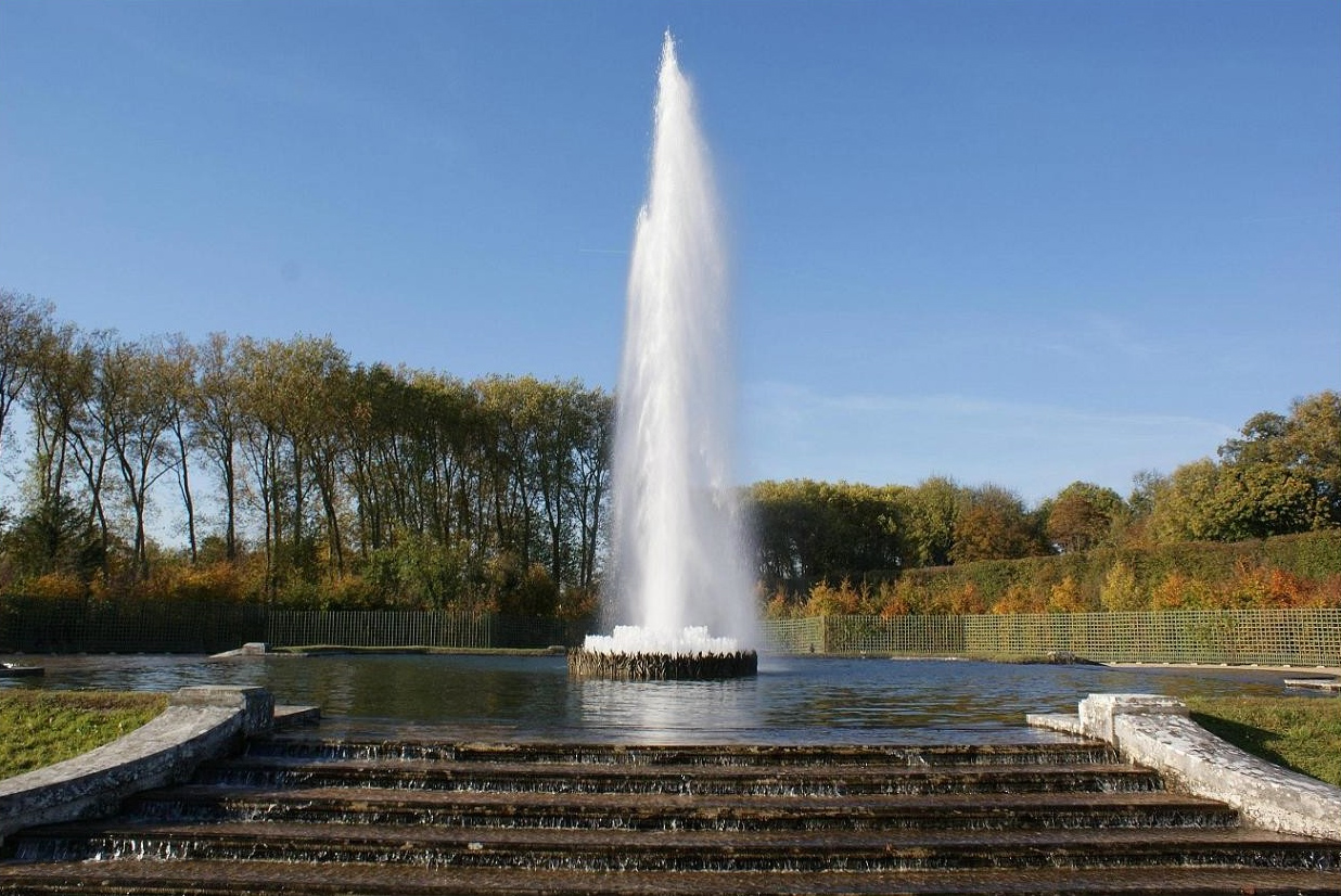 Bosquet de l'Obélisque - Grandes-Eaux 2008 Removed watermark: Jérémy Flavien Hubert